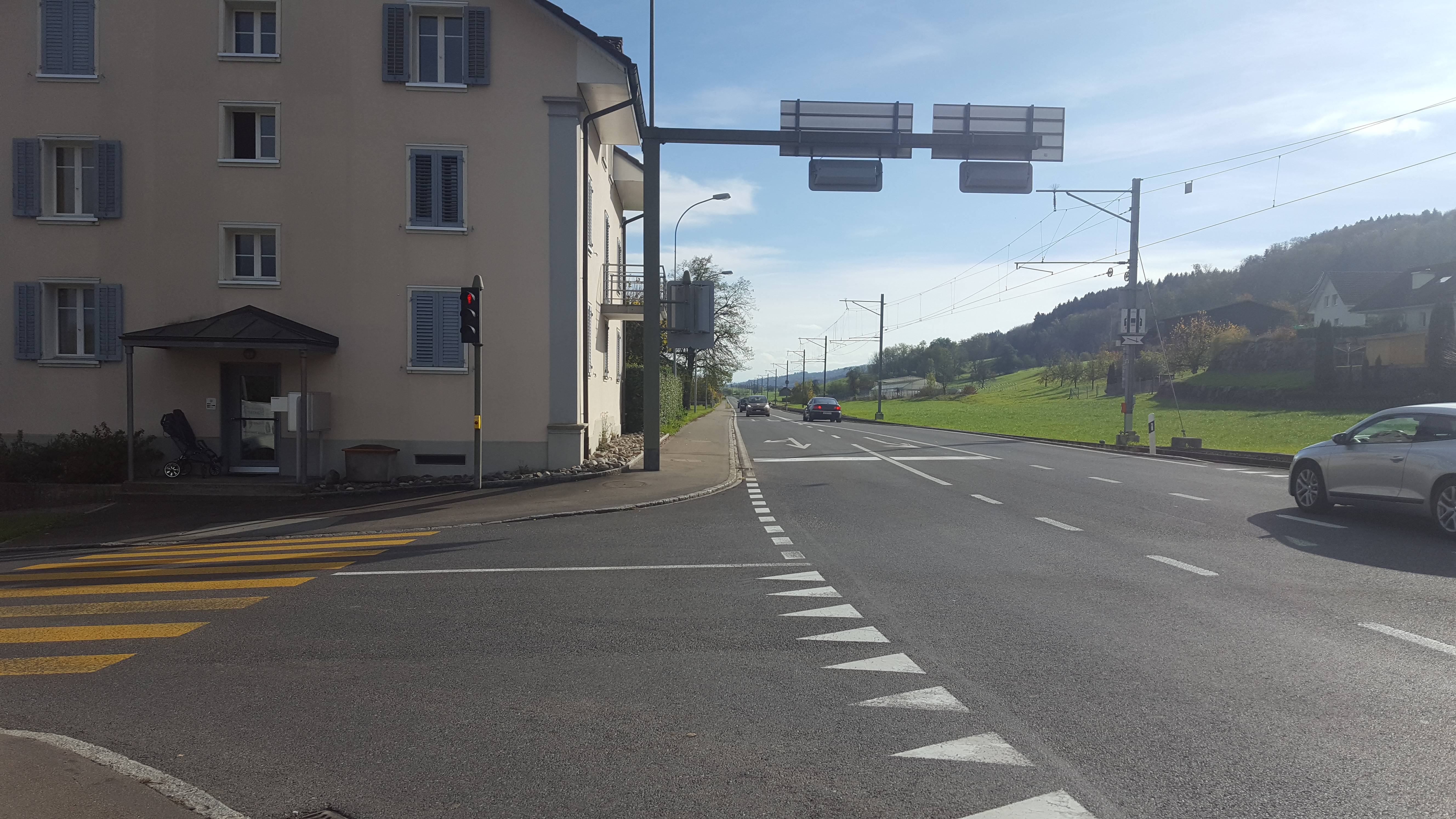 Mosen LU, Richtung HitzkirchLuzern